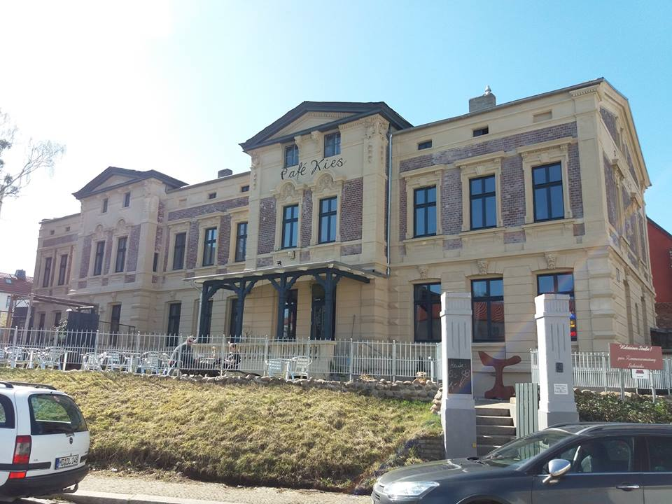 Blick auf das sanierte Café Kies